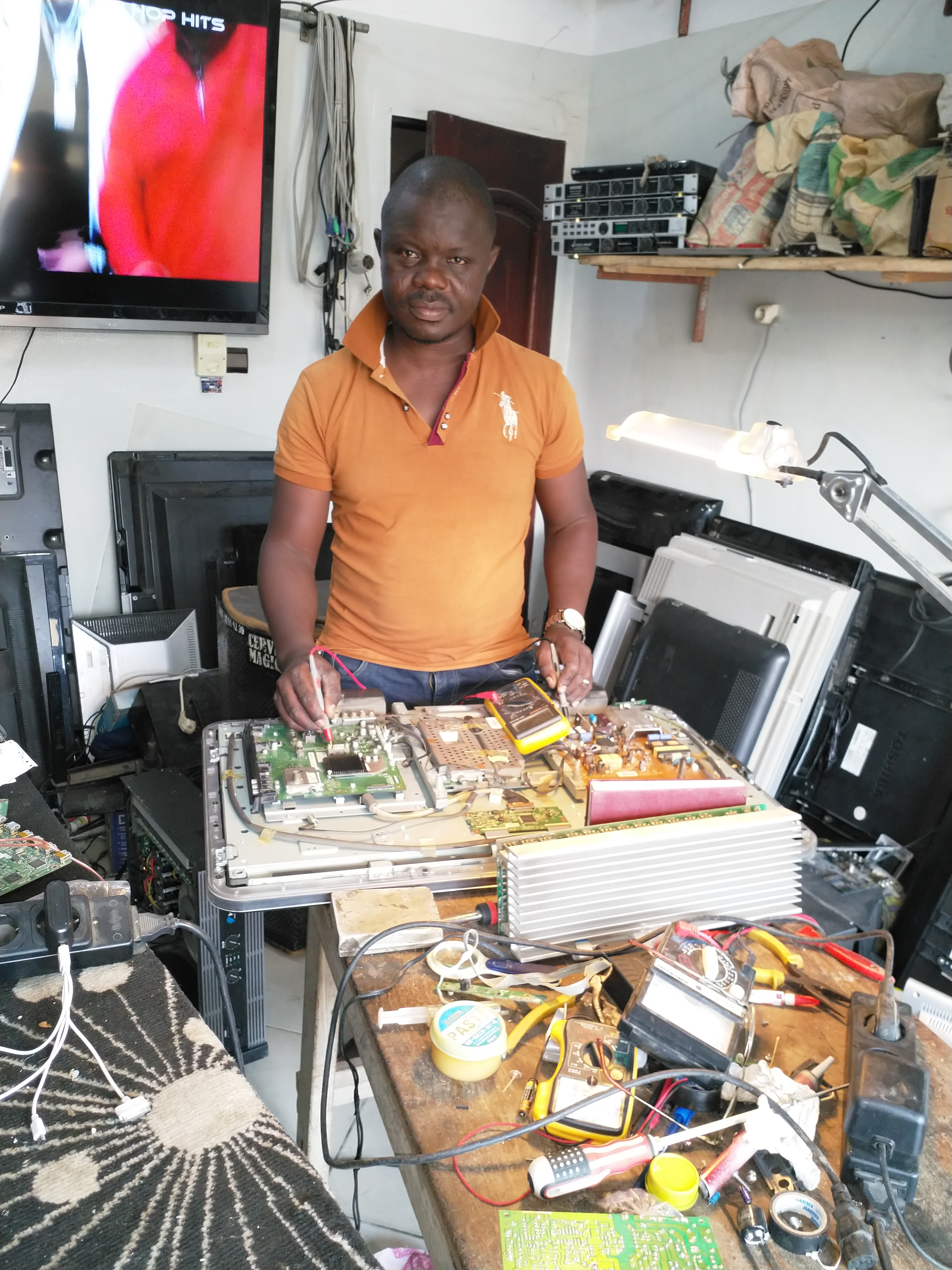 Un réparateur de télévisions à Cotonou au Bénin This is an image of "African people at work" from Benin